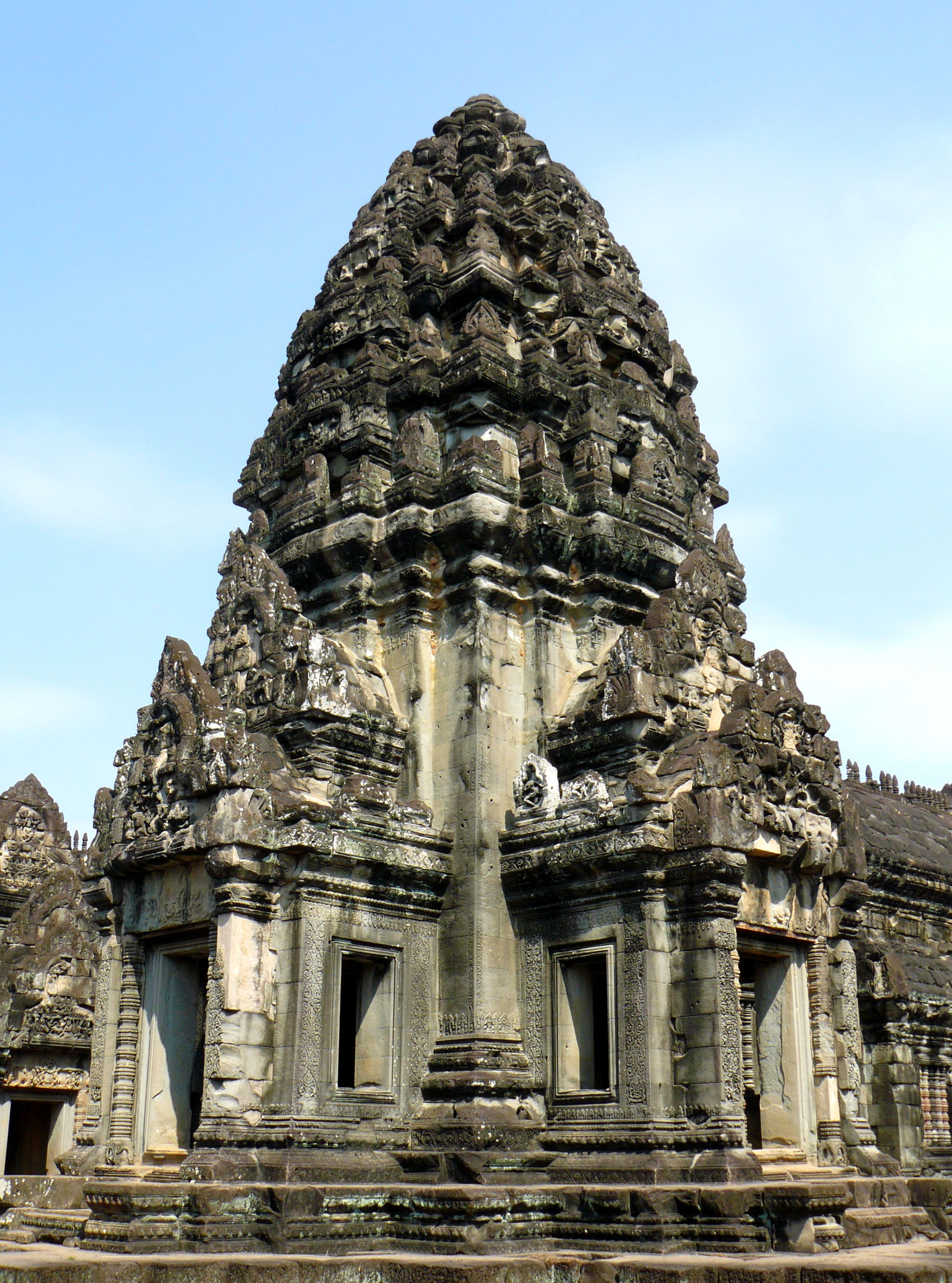 Banteay Samre, Cambodia